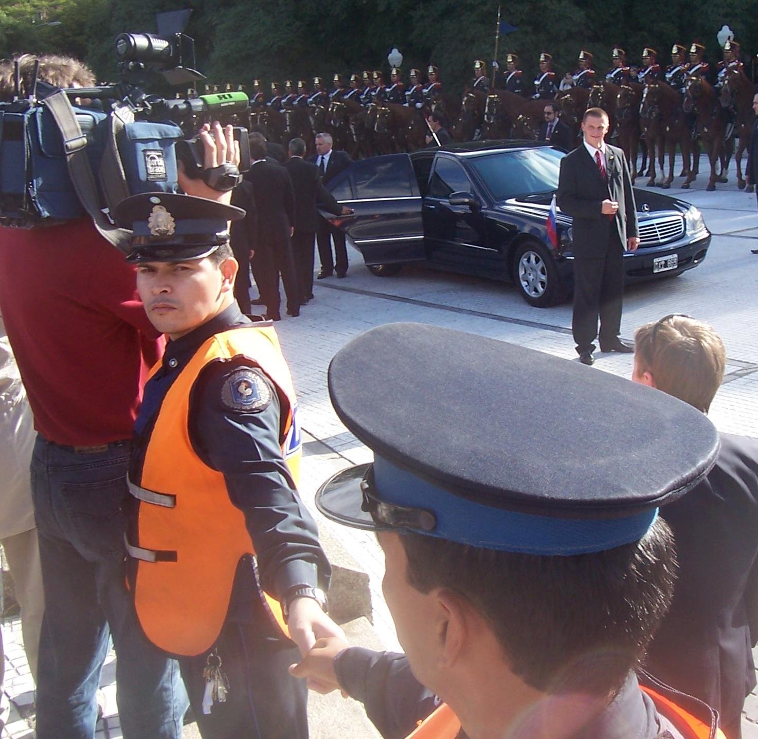 Oficiales de la Policía Federal Argentina custodiando la llegada del primer ministro ruso Mikhail Fradkov a Buenos Aires. Author:Leandro Kibisz (Loco085)